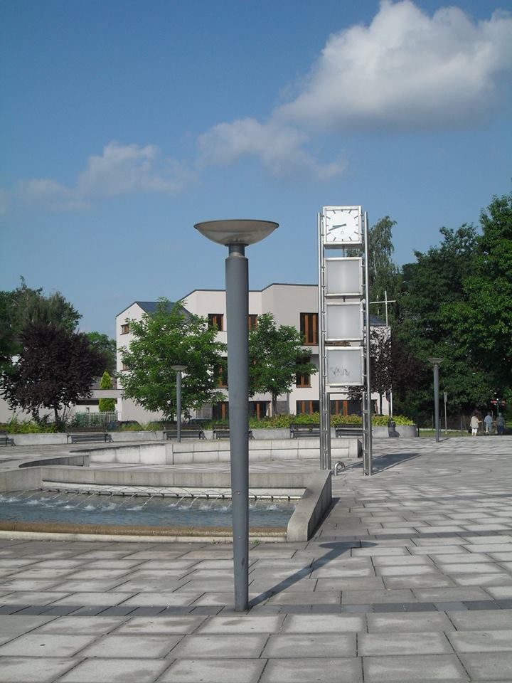 Karviná Universitní náměstí